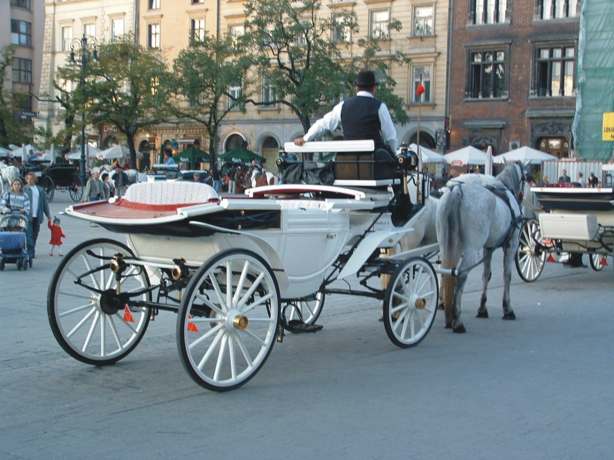 Pferdedroschke (österr. auch Fiaker) am Ring in Krakau, Polen.